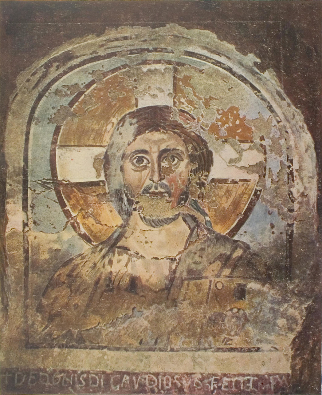 Ponziano Katakomben